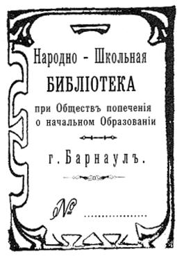 Штамп народно-школьной библиотеки при Обществе попечения о начальном образовании, г. Барнаул